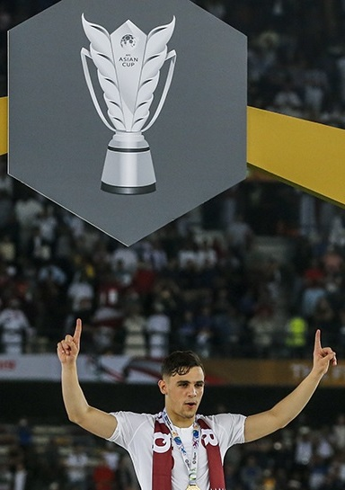 دیدار فینال جام ملت‌های 2019 آسیا بین تیم ملی فوتبال قطر و ژاپن بعدظهر جمعه 12 بهمن در ورزشگاه زاید به قضاوت روشن ایرماتوف ازبکستانی برگزار شد.المعزعلی در دقیقه 12 و عبدالعزیر حاتم 27 و اکرم عفیف در دقیقه 83 با ضربه پنالتی برای قطر گلزنی کردند.برای ژاپن مینامینو 69 موفق به گشودن دروازه قطر شدند.